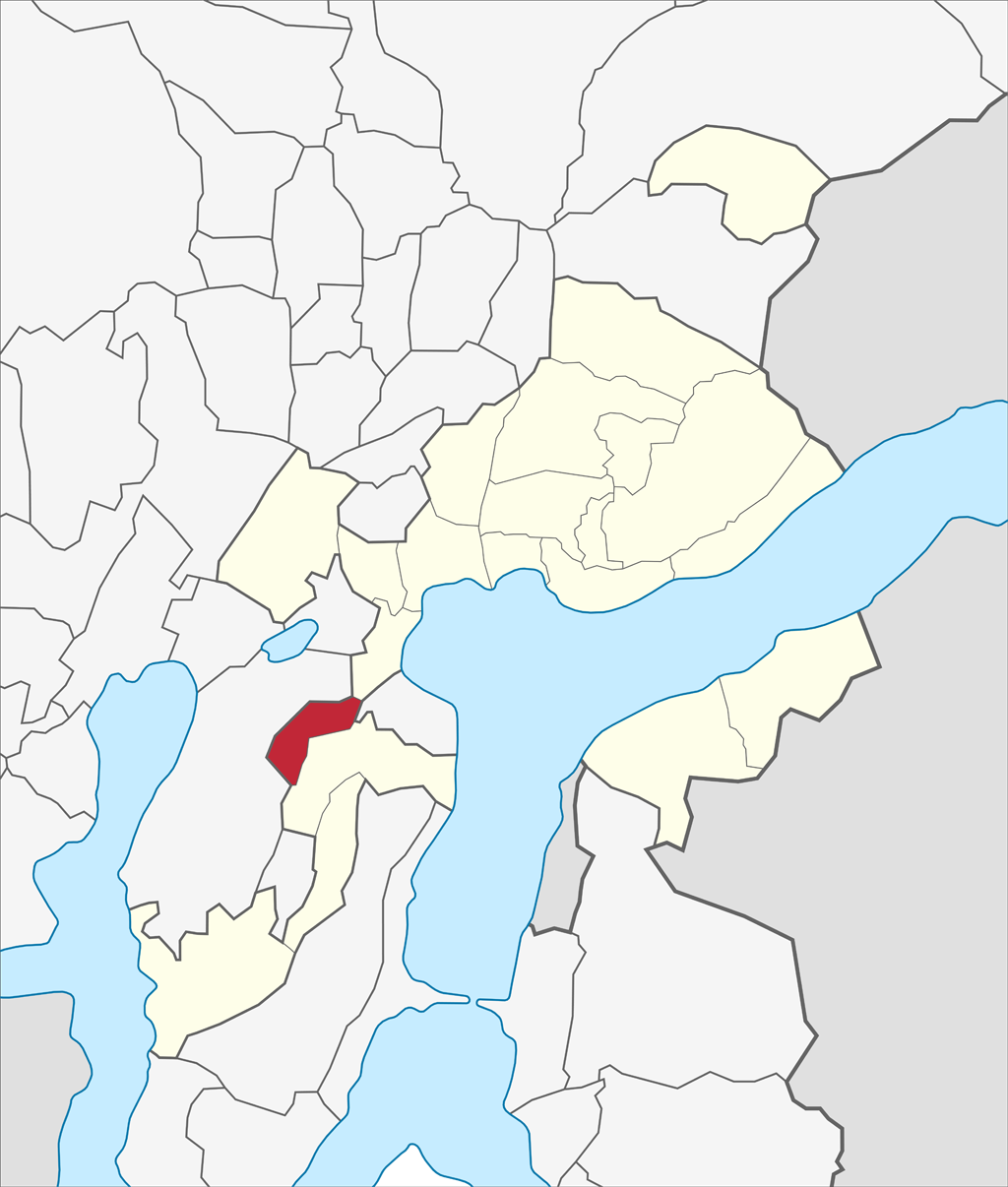 Localizzazione del quartiere di Pambio Noranco nel territorio comunale di Lugano